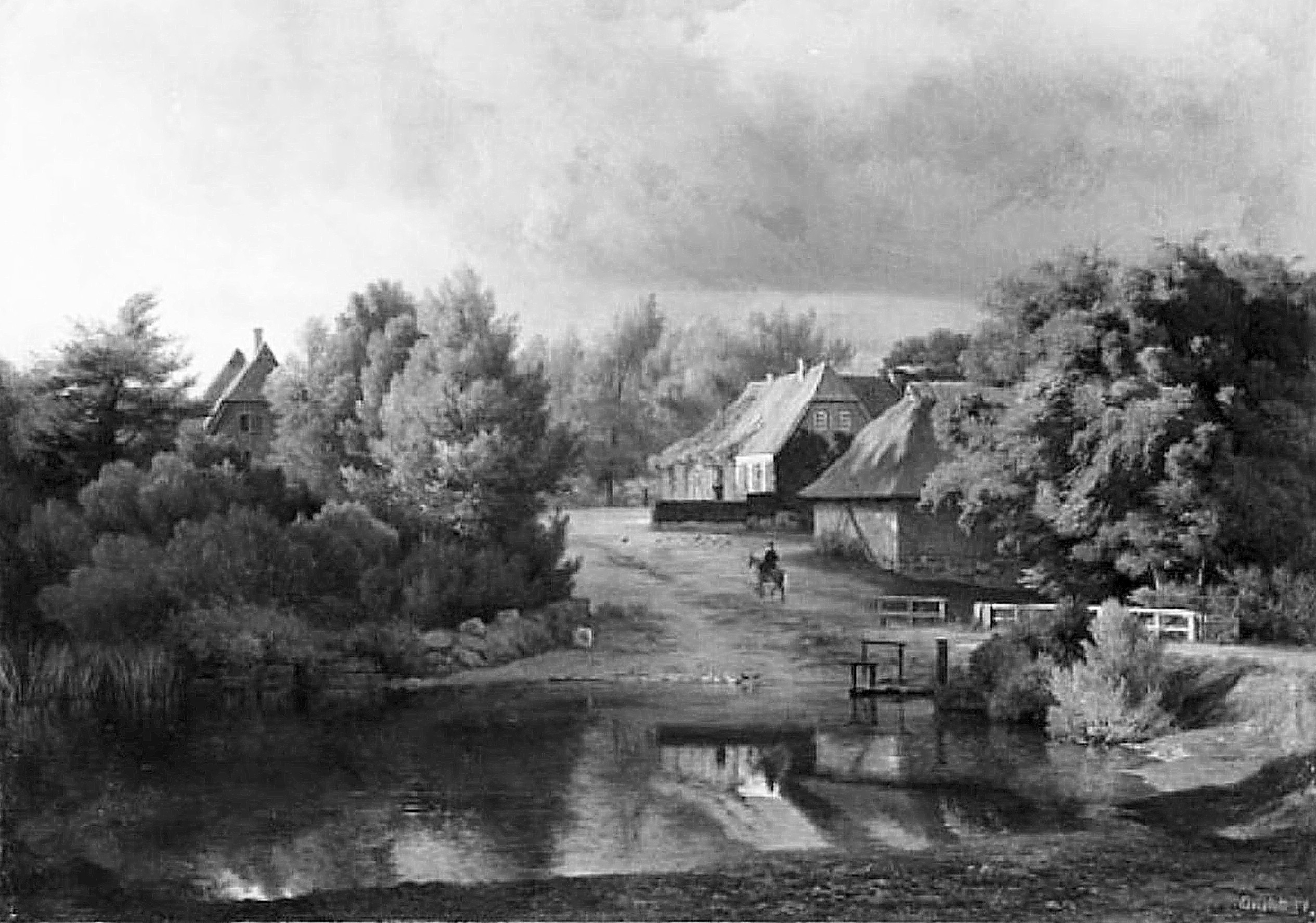 Gut Testorf in Ostholstein, Öl auf Leinwand, Louis Gurlitt